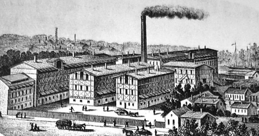 Garbarnia Ludwiga Buchholza w Bydgoszczy przy ul. Garbary. Stan z 1875-1900 r. Obraz Bertholda Jaeckela.